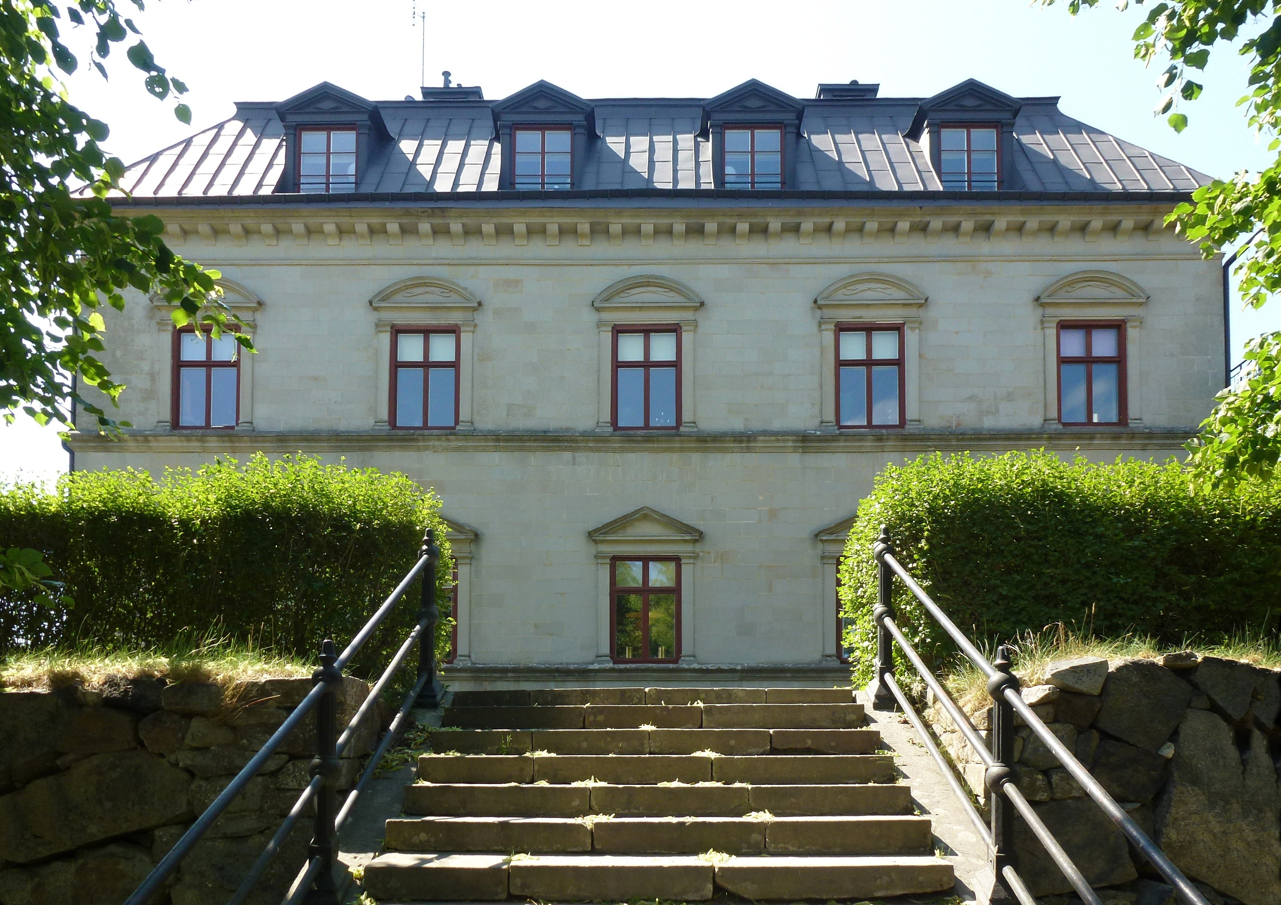 Görvälns slott fasad nordost